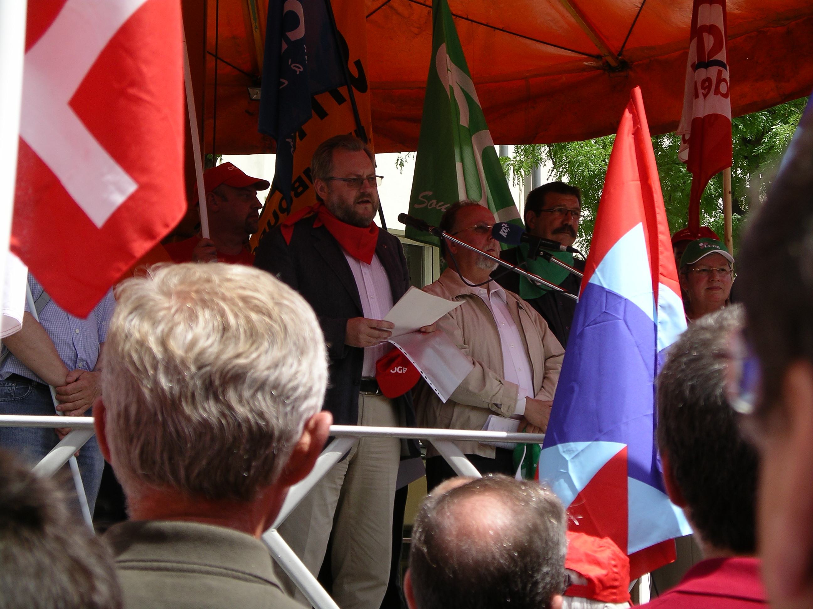 Jean-Claude Reding bei einer Internationalen Kundgebung